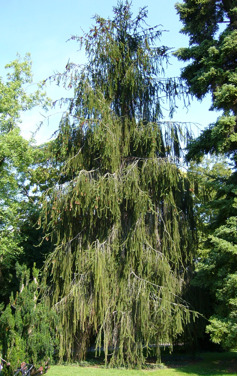 Picea abies 'Virgata': Baum